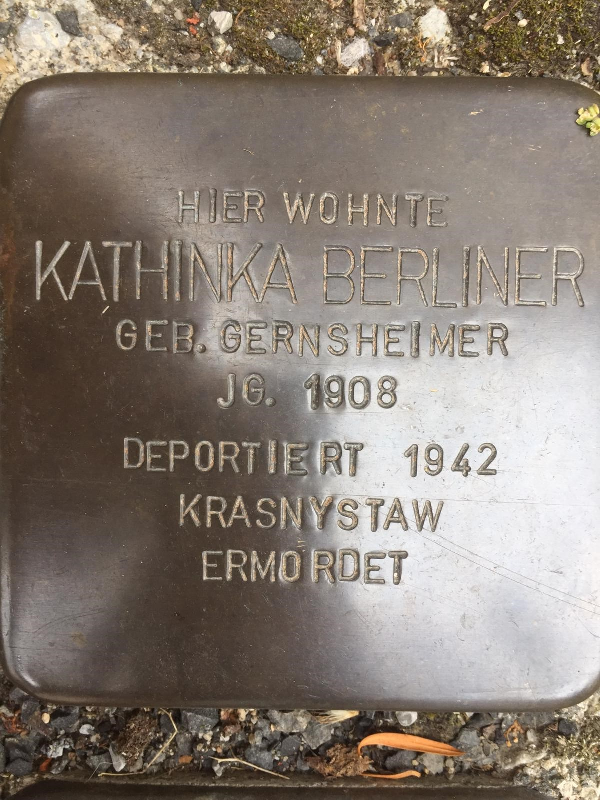 Stolperstein